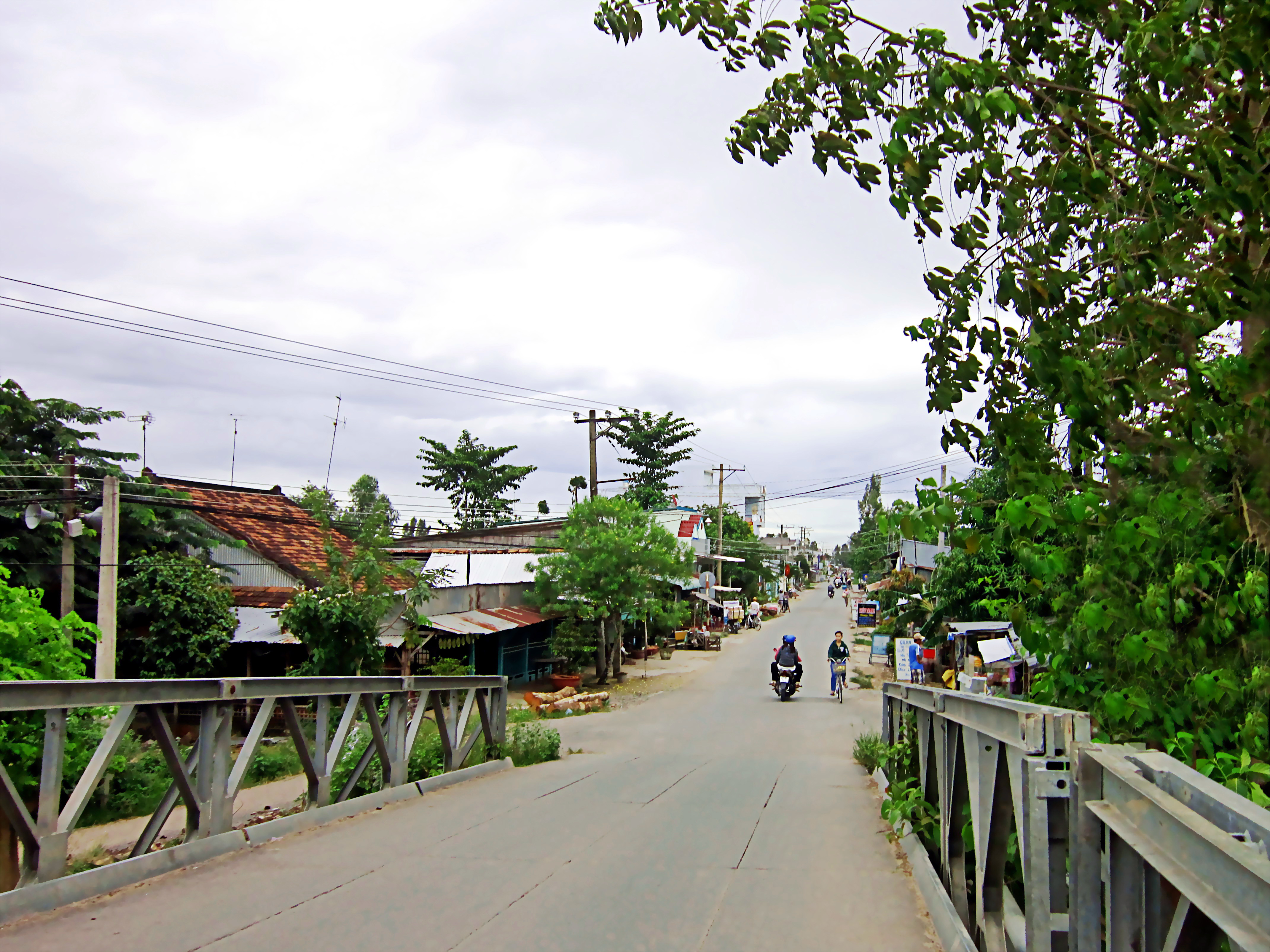 Trên Hương lộ 1, đoạn chợ An Thới thuộc xã An Thạnh Trung, huyện Chợ Mới, tỉnh An Giang, Việt Nam.